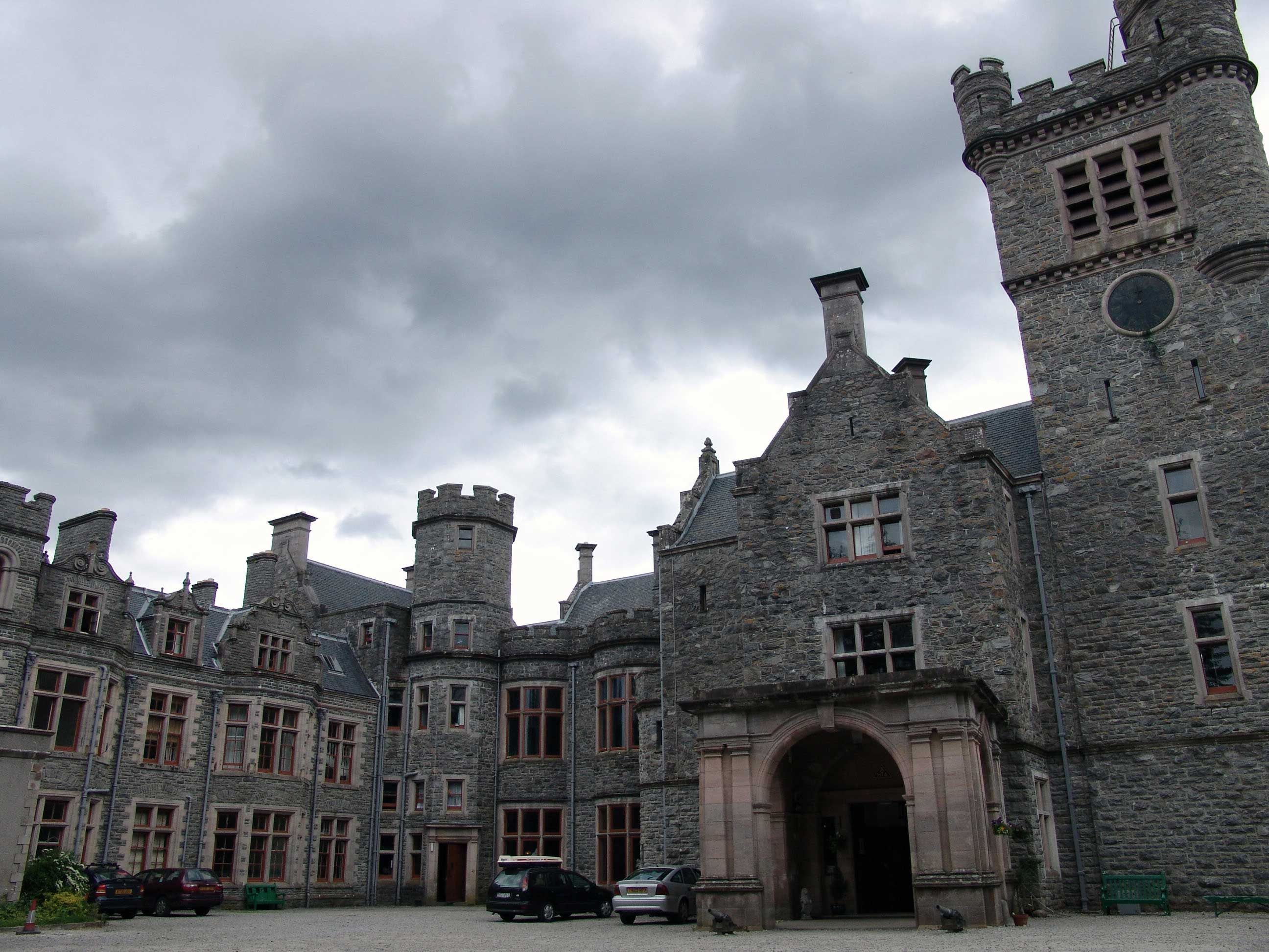 CarbisdaleCastle